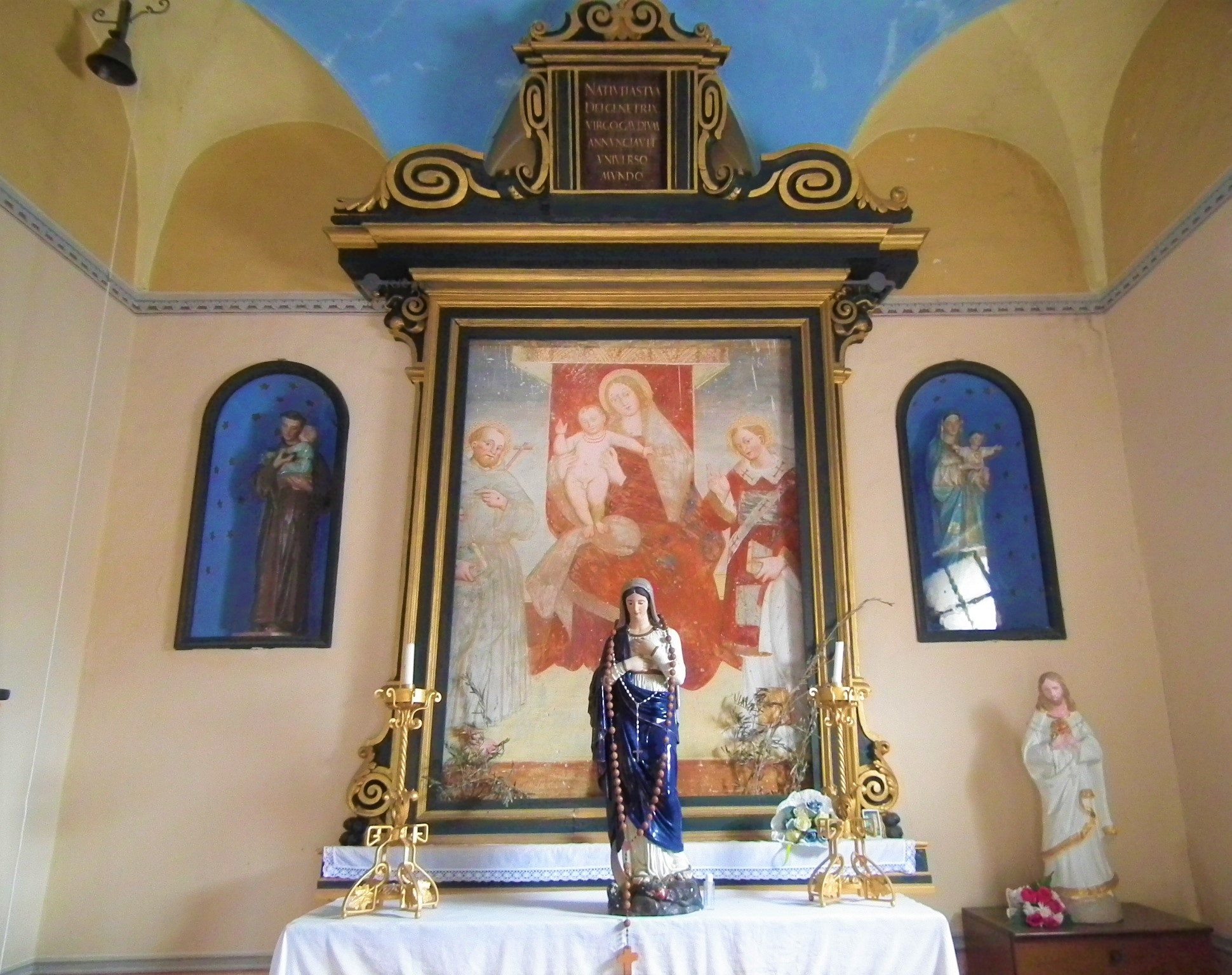 Altare della Chiesa di Sant'Antonio nel comune di Mandello Vitta.